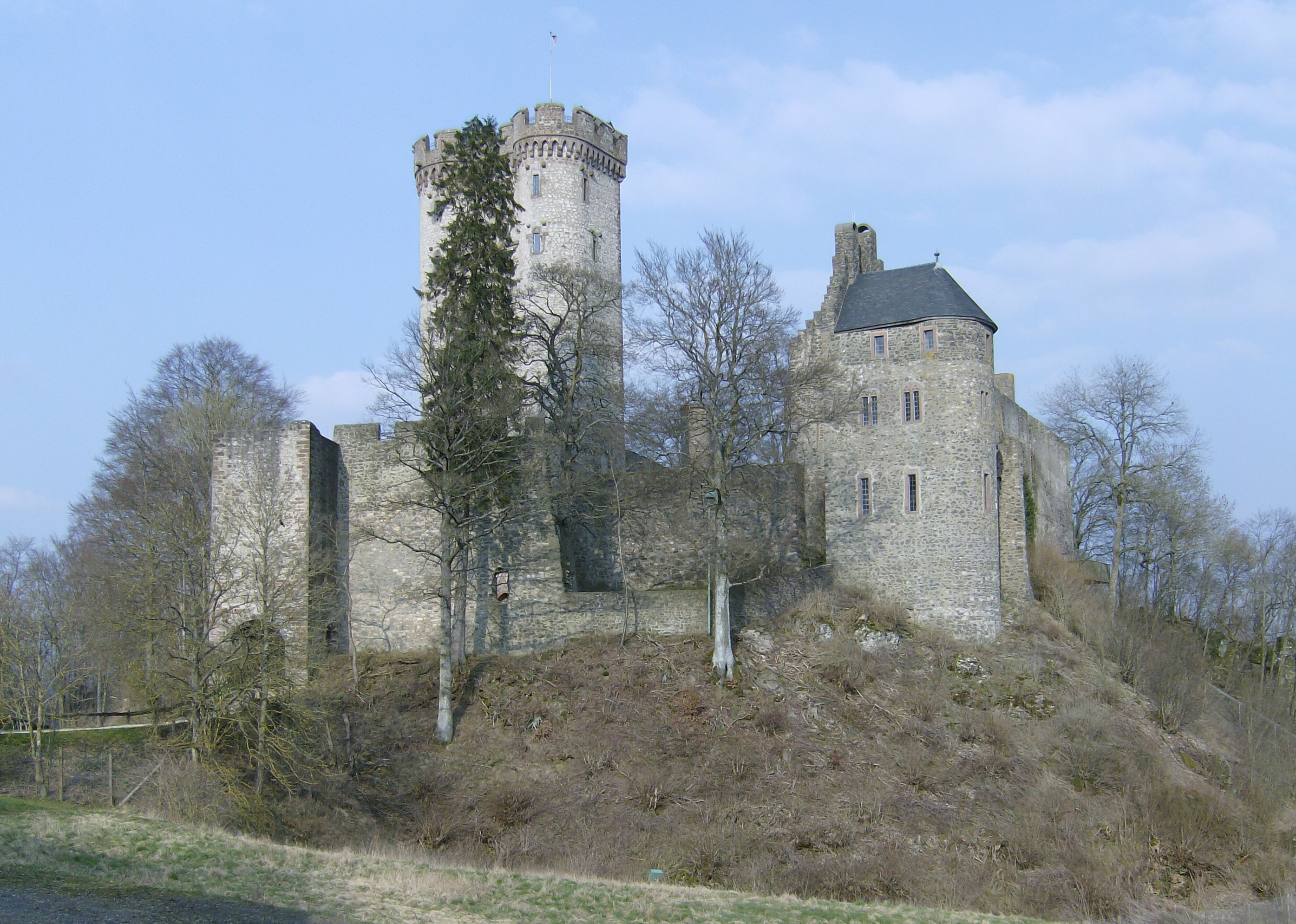 Die Kasselburg bei Pelm